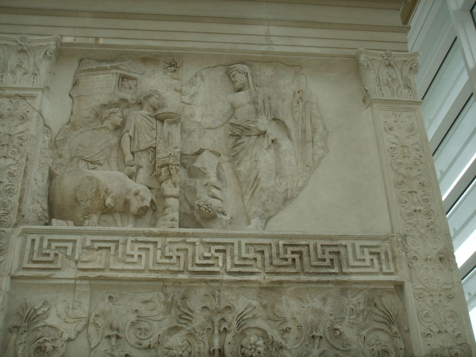 Ara Pacis, south side in Rome, Italy.